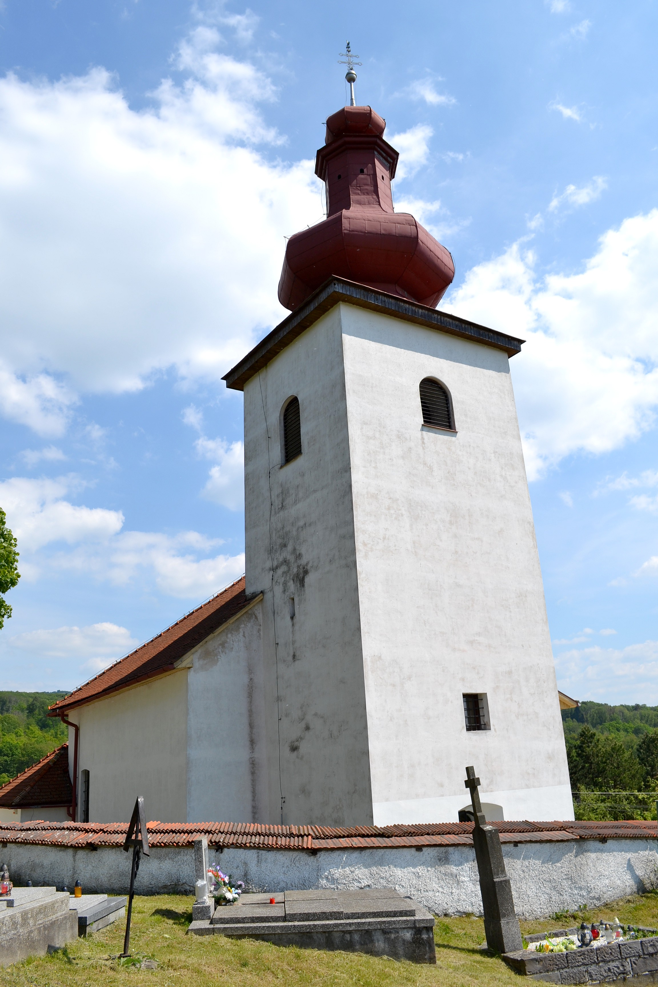 Slaská (okr. Žiar nad Hronom), Kostol svätého Gála